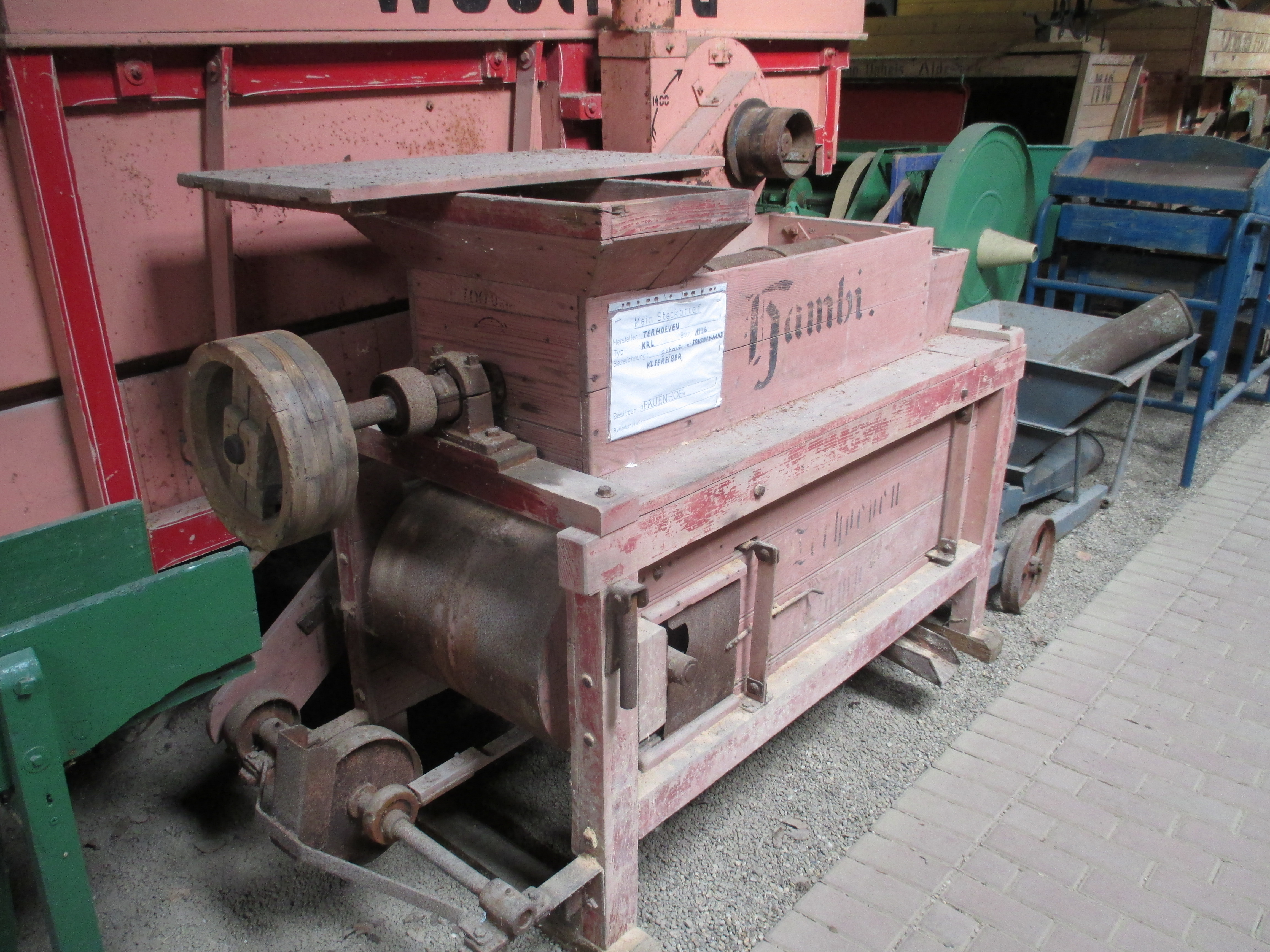 Traktoren und Landmaschinen im Traktorenmuseum Pauenhof: Terhoefen Kleereibe KRL, Baujahr: 1936, Gerät wurde zur Gewinnung von Kleesamen genutzt.